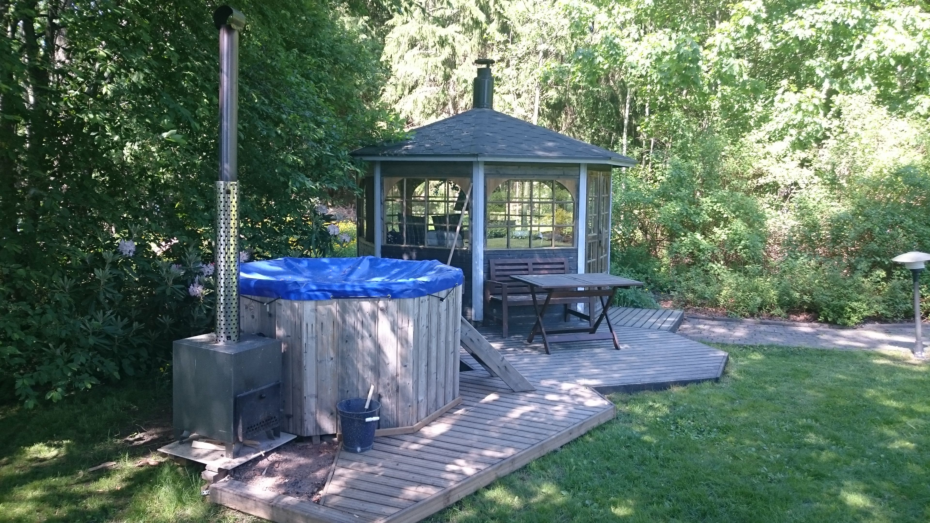 Ulkoisella kamiinalla varustettu puulämmitteinen palju Strukan vuokrfamökillä Pyhtäällä